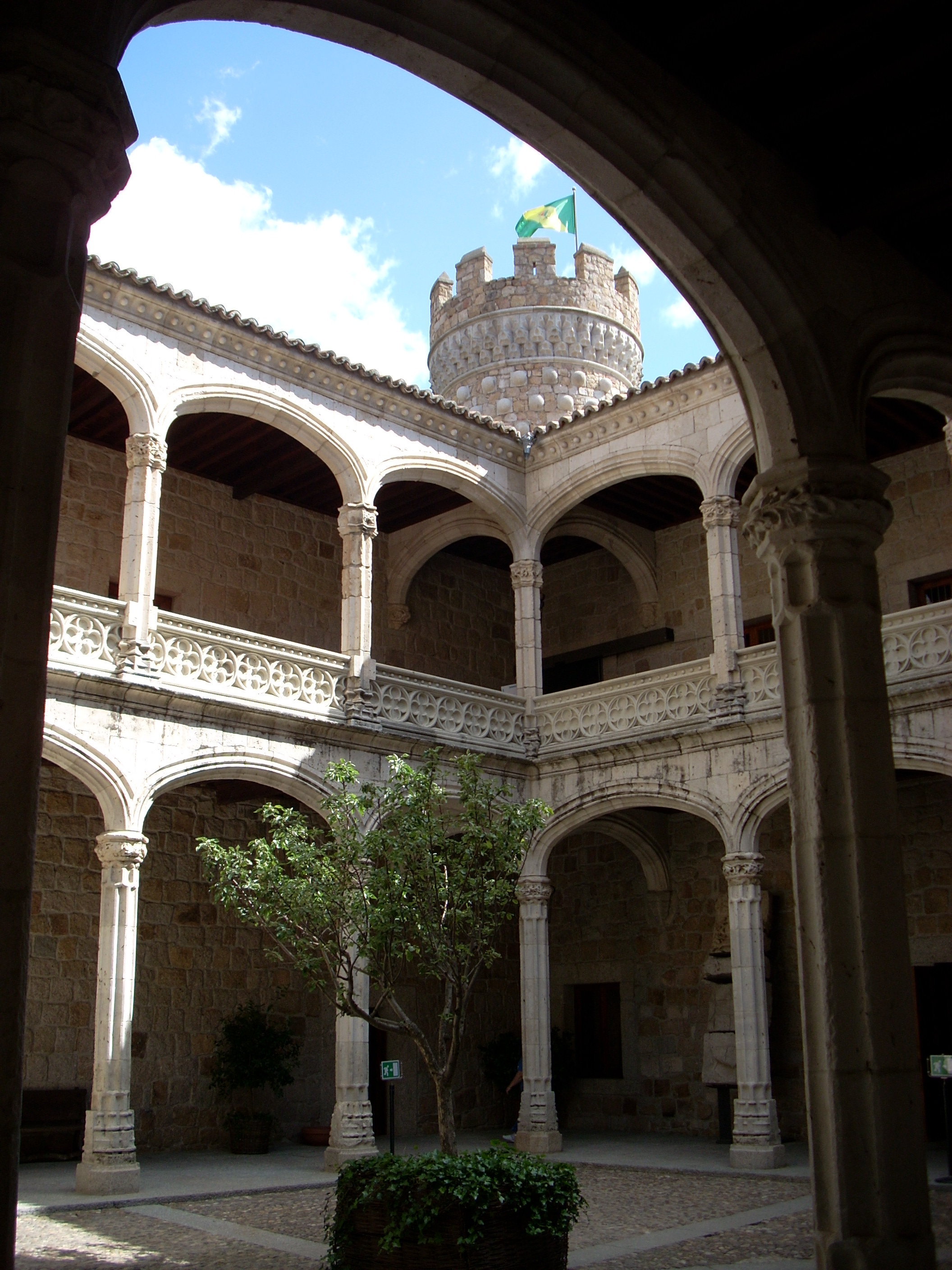 Castello di Manzanares el Real, Madrid, Spagna